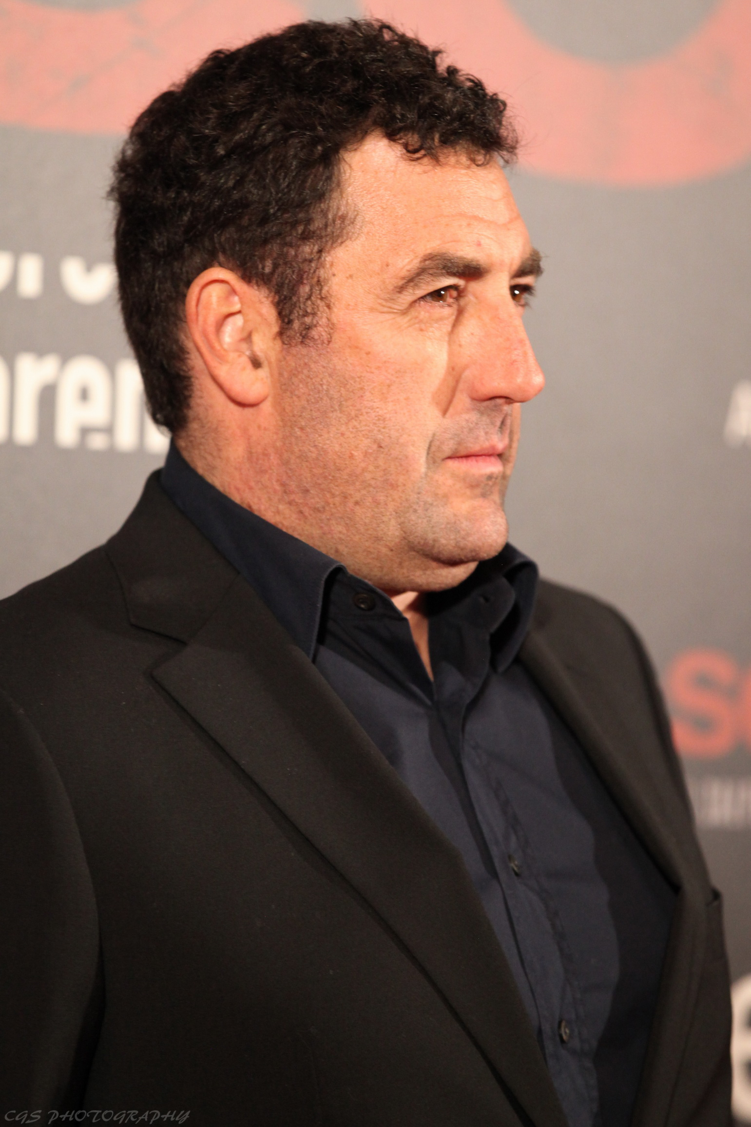 Película de Daniel Calparsoro protagonizada por Alberto Ammann, Antonio de la Torre, Inma Cuesta y Karra Elejalde.